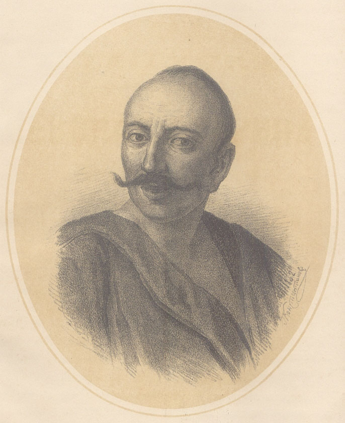 портрет Івана Гонти